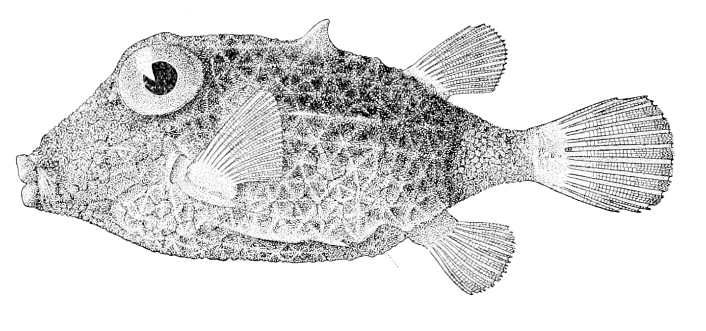 Kentrocapros aculeatus